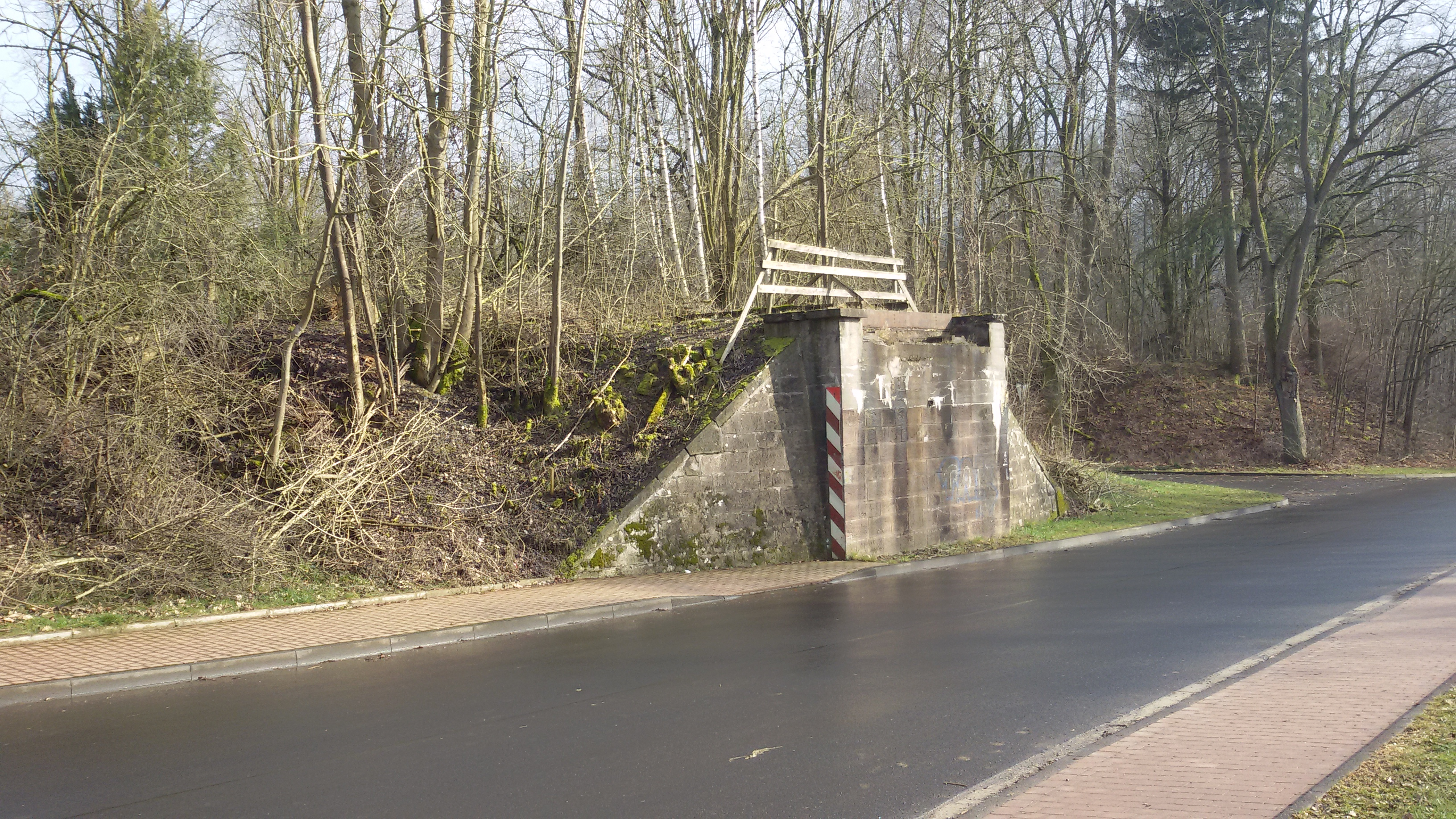 Zu sehen sind auf diesem Bild die Überbleibsel der bereits 2011 abgerissenen Bahnbrücke, welche den Bahnhof Waldkappel mit der Strecke nach Kassel verband und durch die Errichtung eines Bauhofs gegenüber des Zufahrtsweges mittlerweile abgeschnitten ist.